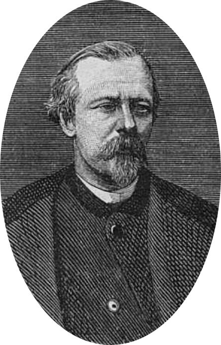 Соколов Павел Петрович, художник